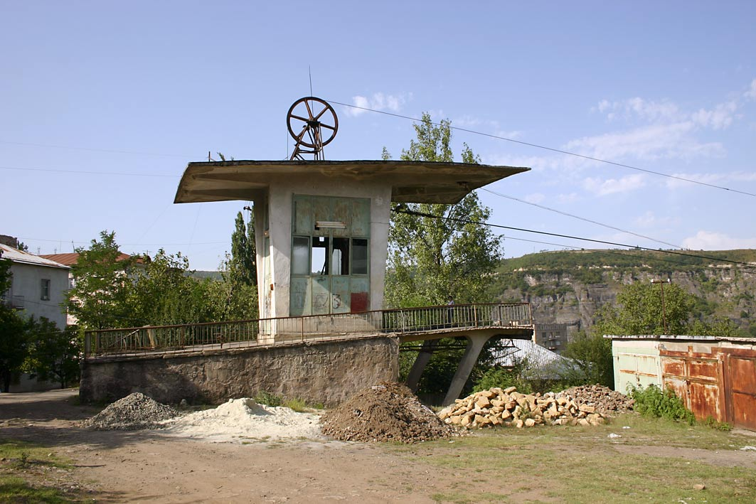 ჭიათურა = Tschiatura - Seilbahnstation